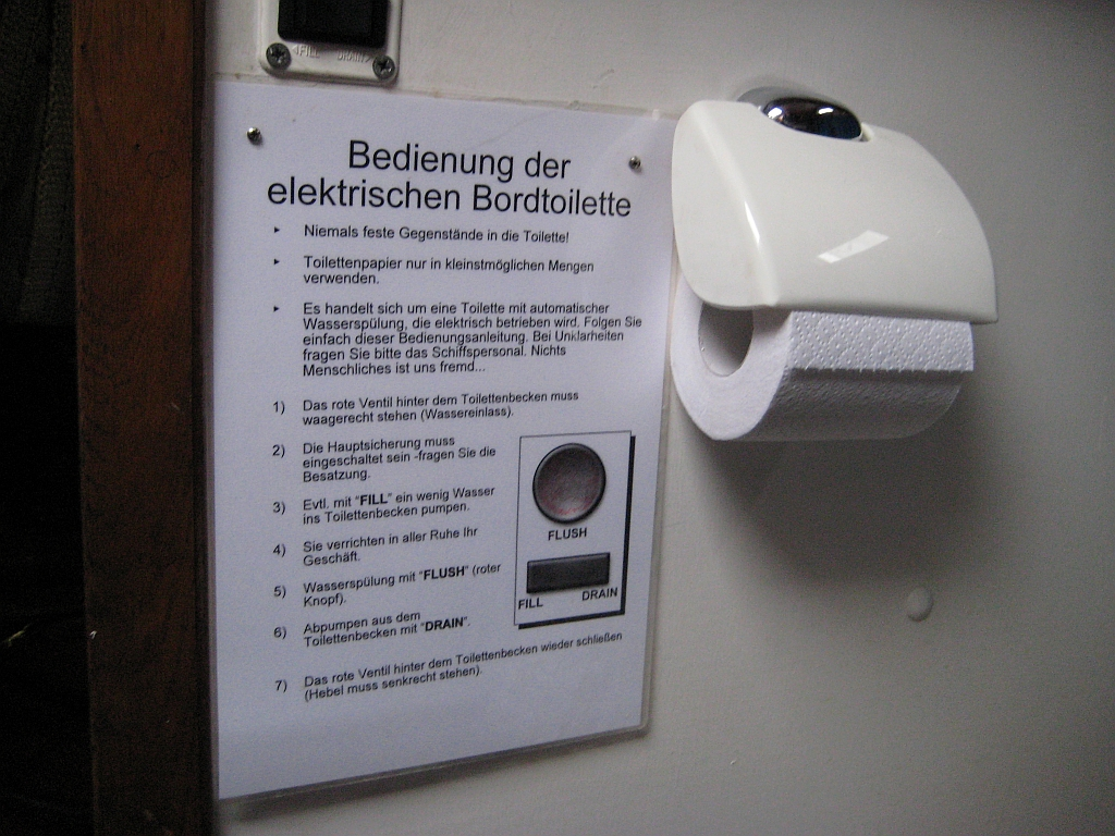 Bedienungsanleitung einer elektrischen Bordtoilette an Bord eines alten Segelschiffes